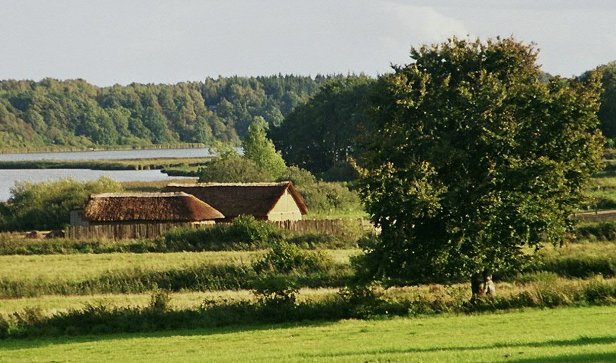 Source: made by WikiTour 2005 Description: (de:) Haithabu - Rekonstruierte Wikinger-Langhäuser innerhalb des Halbkreiswalls mit Blick auf das Haddebyer Noor